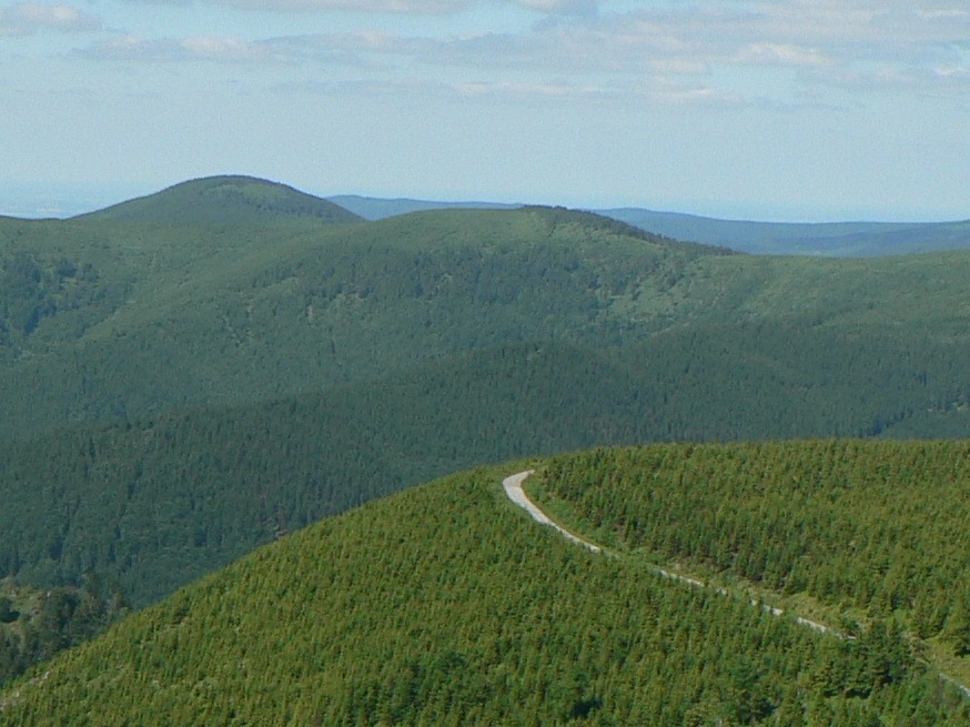 Pohled na Výrovku z Mravenečníku, vlevo vzadu Velký Klín